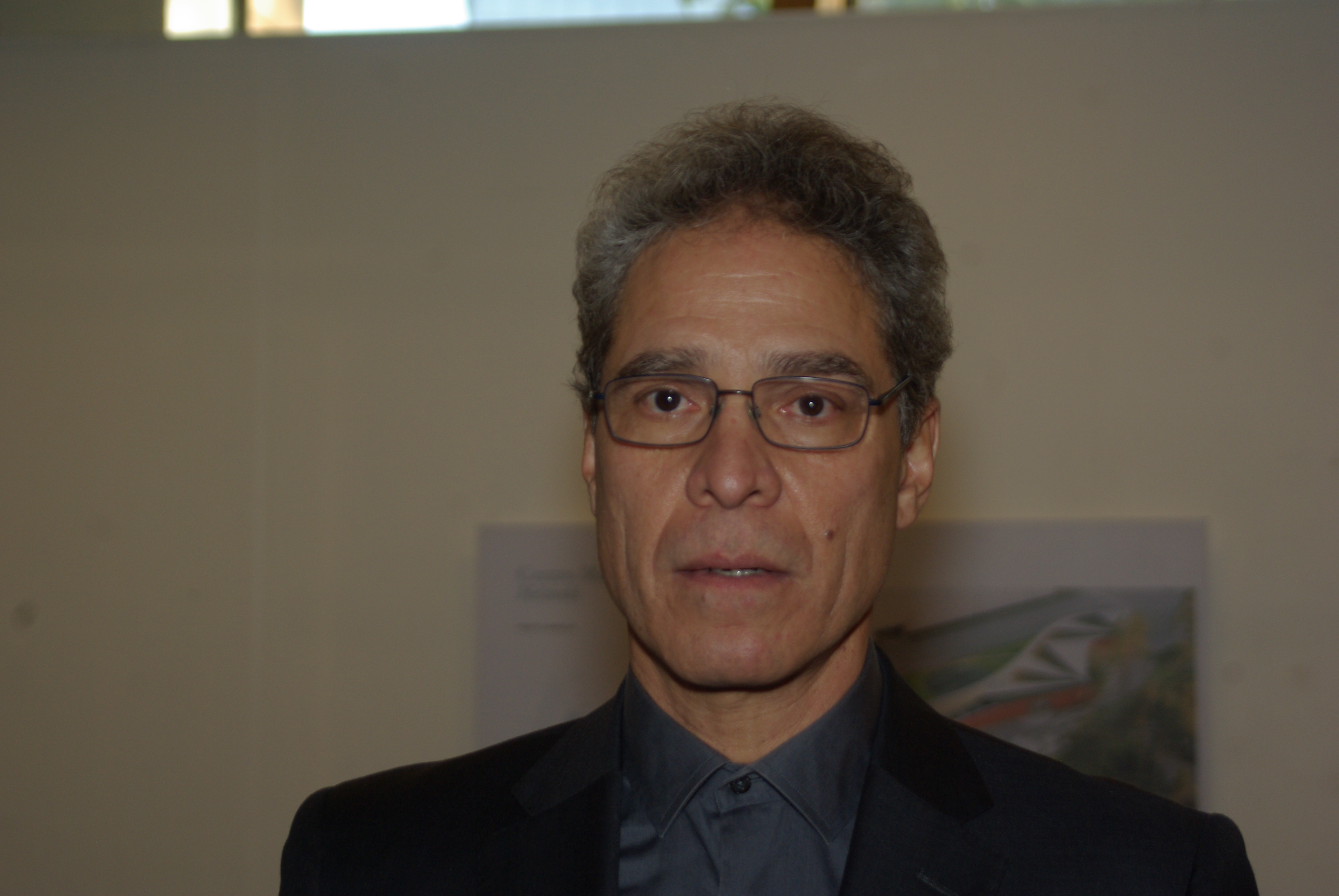 El escritor guatemalteco Rodrigo Rey Rosa durante la entrega del Premio José Donoso en la Feria Internacional del Libro de Santiago 2015